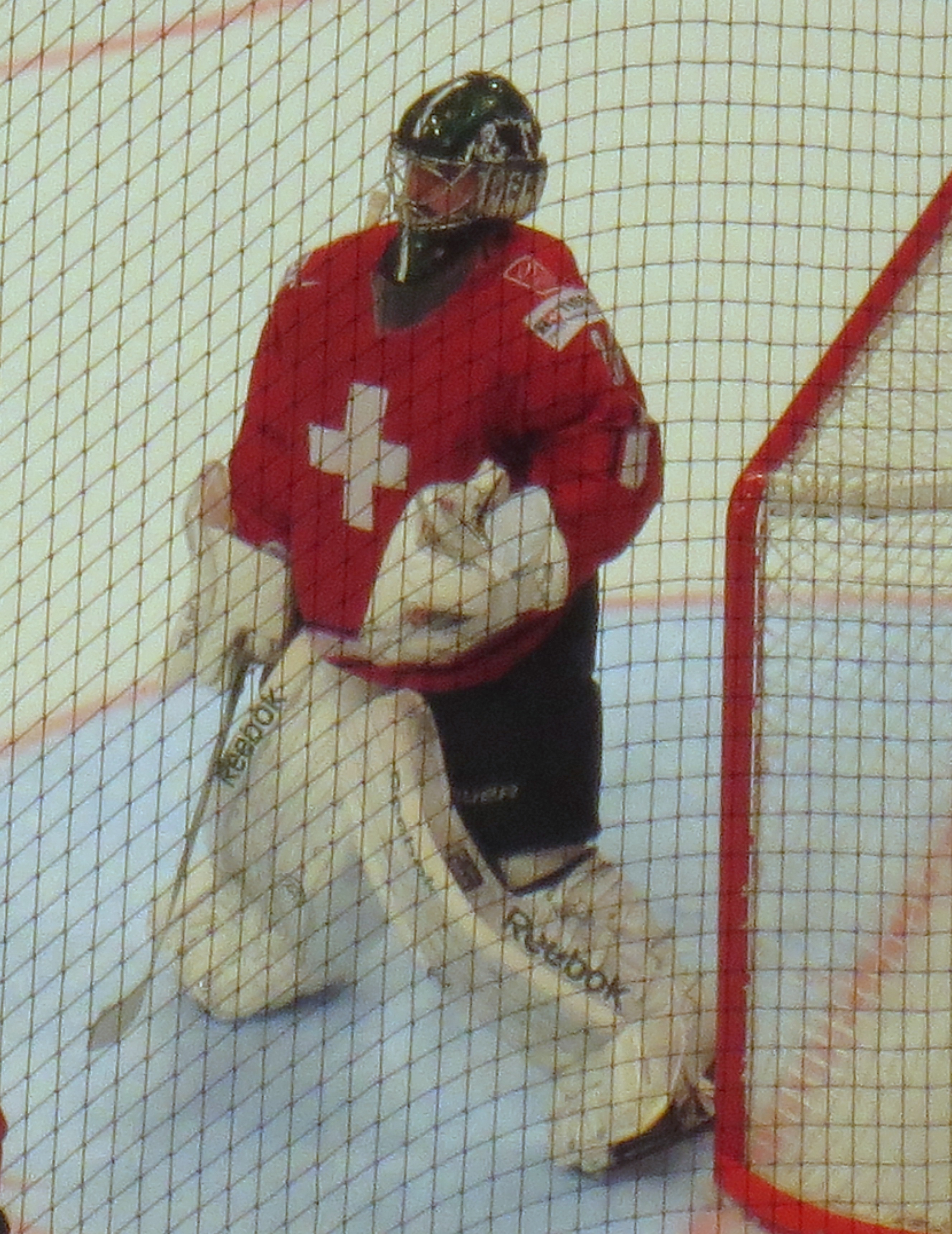 Martin Gerber à la finale du championnat du monde 2013